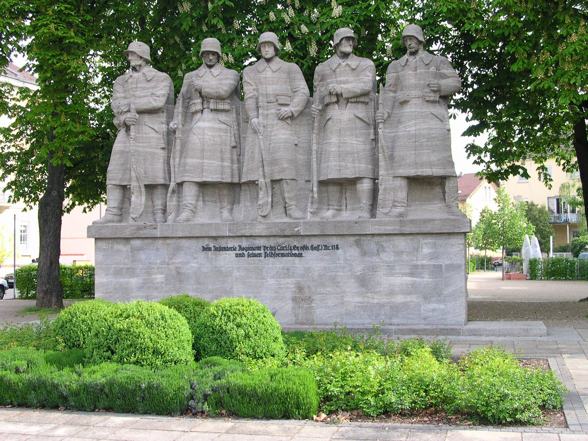 Worms, Denkmal für das “Infanterie Regiment Prinz Carl (4. Großh. Hess.) Nr. 118 und seine Feldformationen”, enthüllt am 21. August 1932, gestaltet von Paul Birr [1]